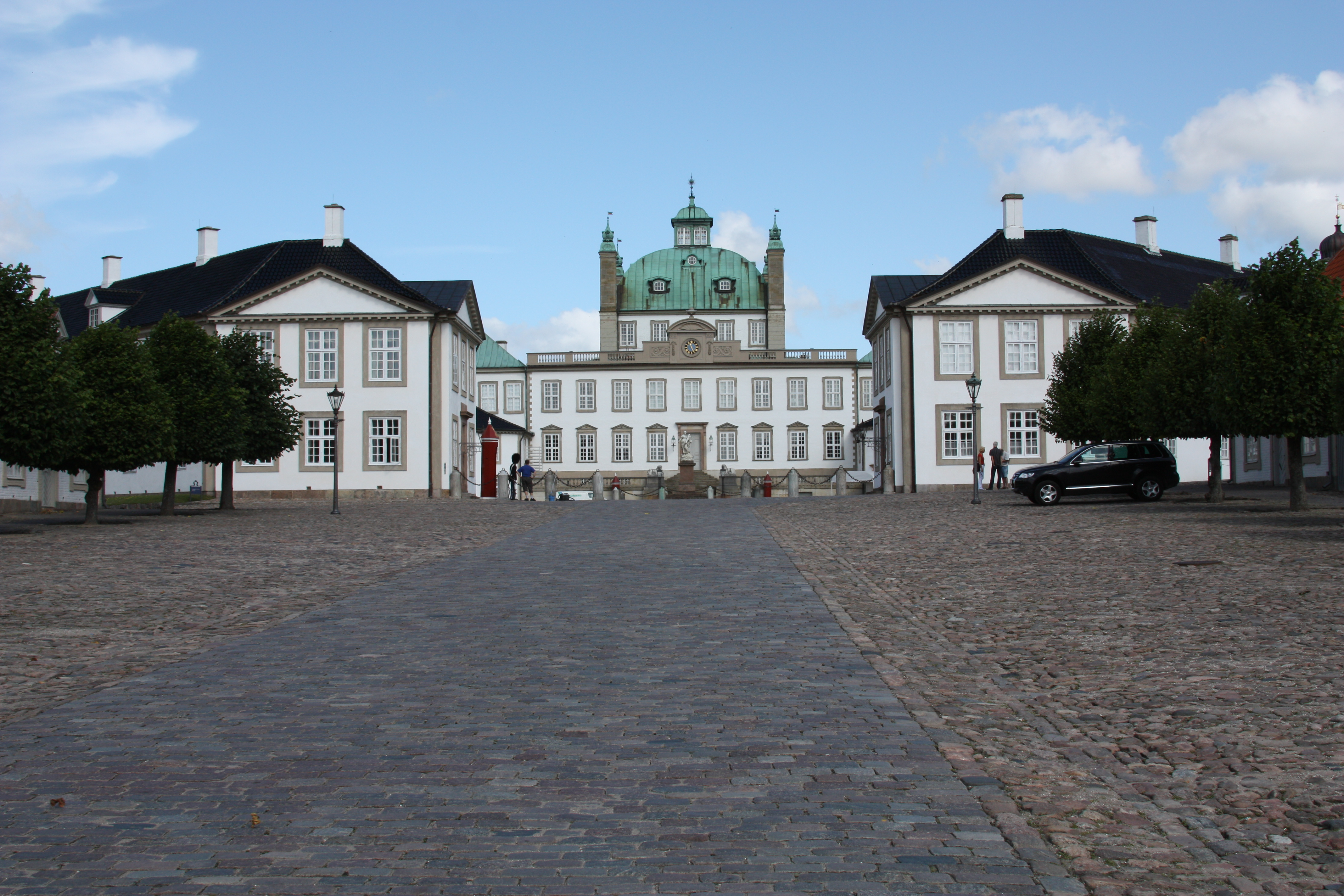 Fredensborg Slot, near Copenhagen, August 2009